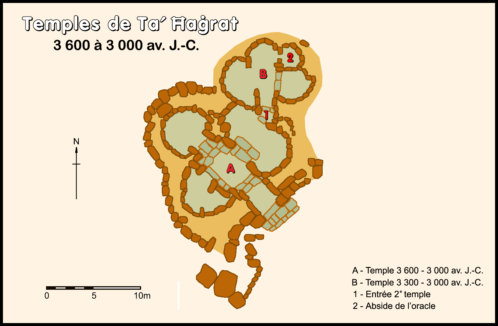 plan du site des temples de Ta' Hagrat